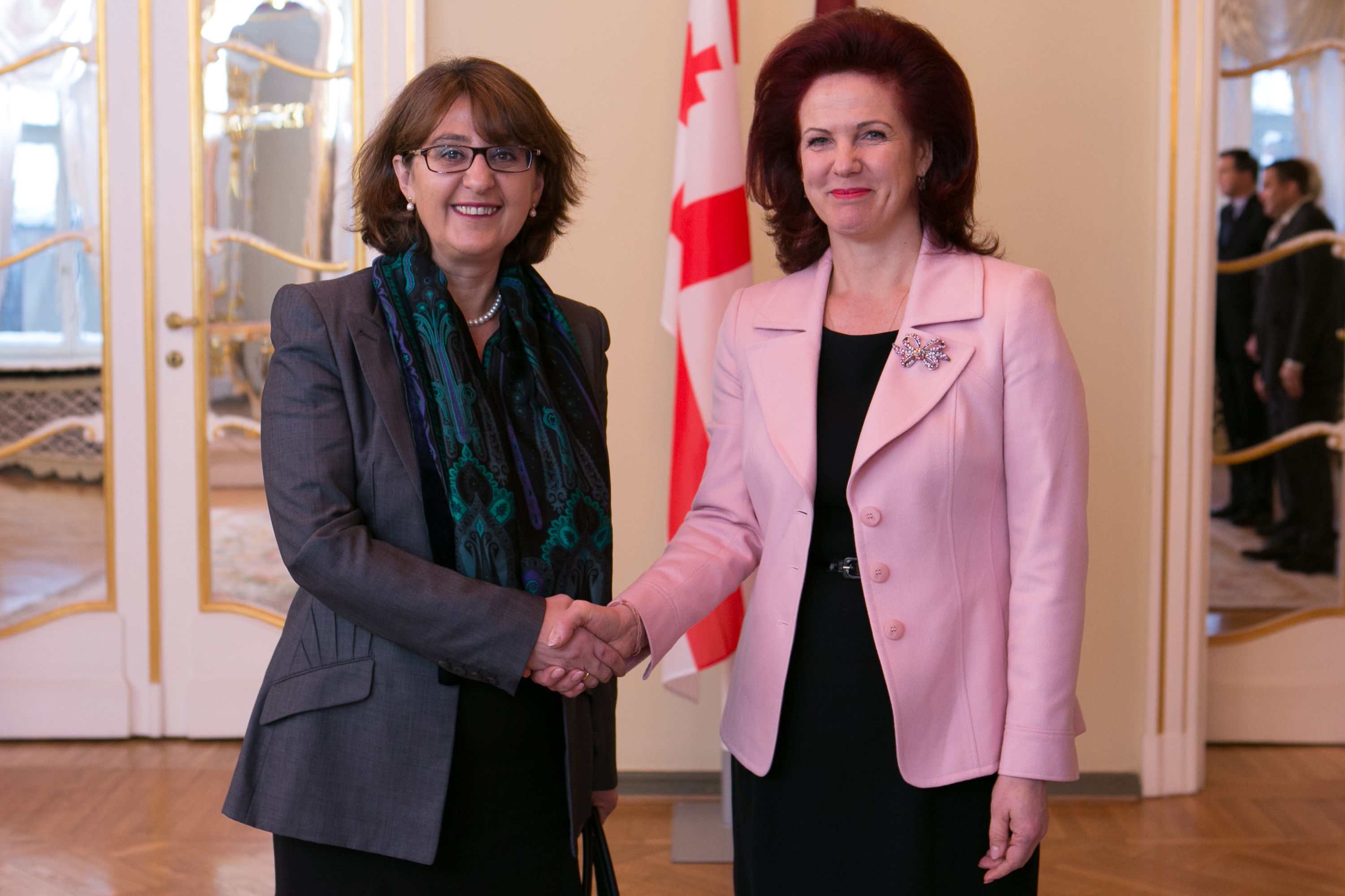 2013.gada 14.janvāris. Saeimas priekšsēdētāja Solvita Āboltiņa tiekas ar Gruzijas ārlietu ministri Maiju Pandžikidzi (Maia Panjikidze). Foto: Ernests Dinka, Saeimas Kanceleja